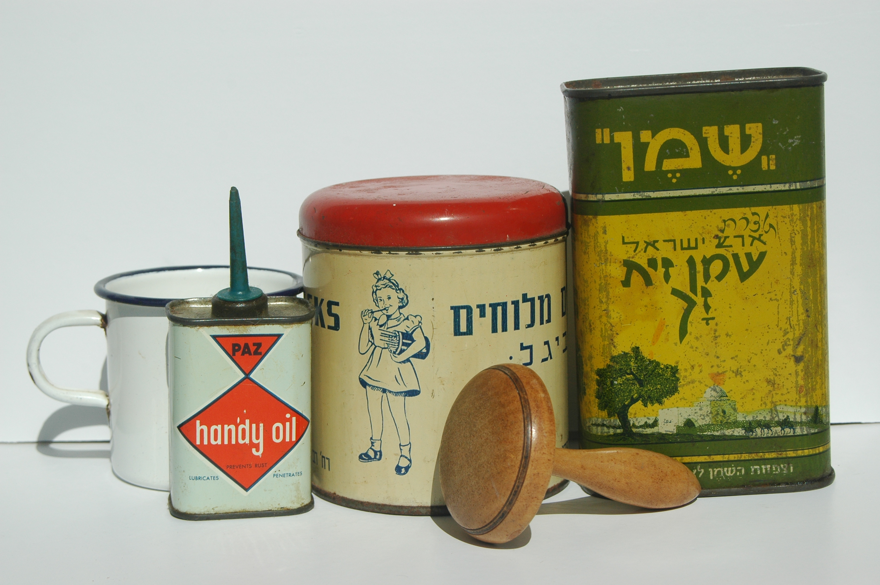 מקבץ של פרטי ישראלינה הכולל קופסת פח של שמן זית שיוצר על ידי חברת שמן חיפה, קופסת פח של ביגלים מלוחים של חברת ביגל. משמנת של חברת הדלק פז ועעוד